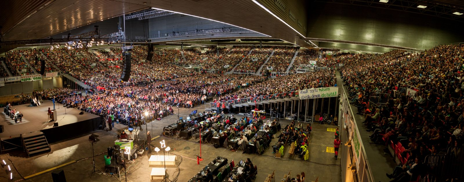 2017ko Bertsolari Txapelketa Nagusiko finalean Argiako Dani Blancok egindako argazkia.